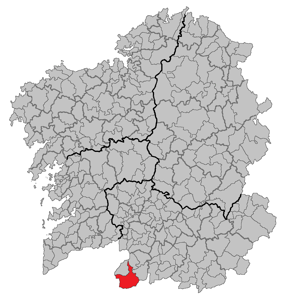 Mapa coa localización do concello de Lobios.